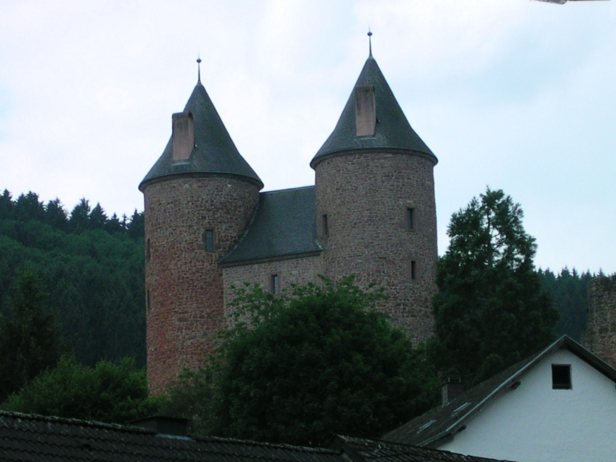 Die Bertradaburg in Mürlenbach, Rheinland-Pfalz